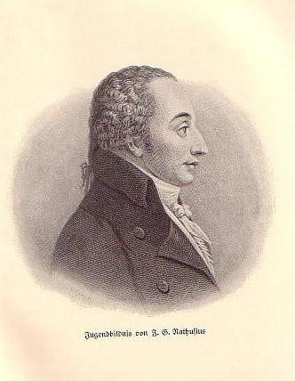 Johann Gottlob Nathusius (* 30. April 1760 in Baruth/Mark; † 23. Juli 1835 in Althaldensleben), ein Jugendbildnis des Magdeburger Kaufmanns und Unternehmers